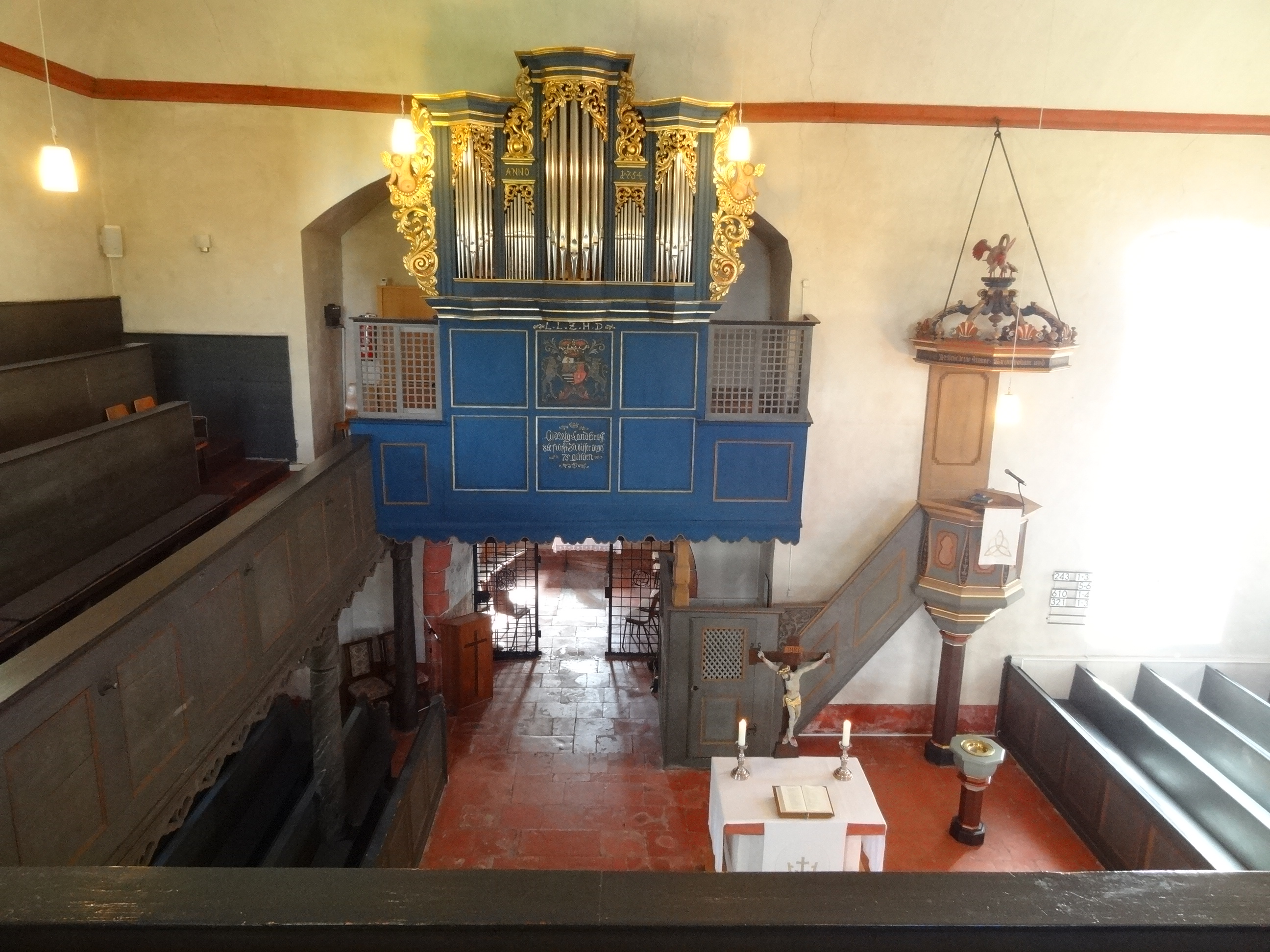 Evangelische Pfarrkirche (Ostheim)